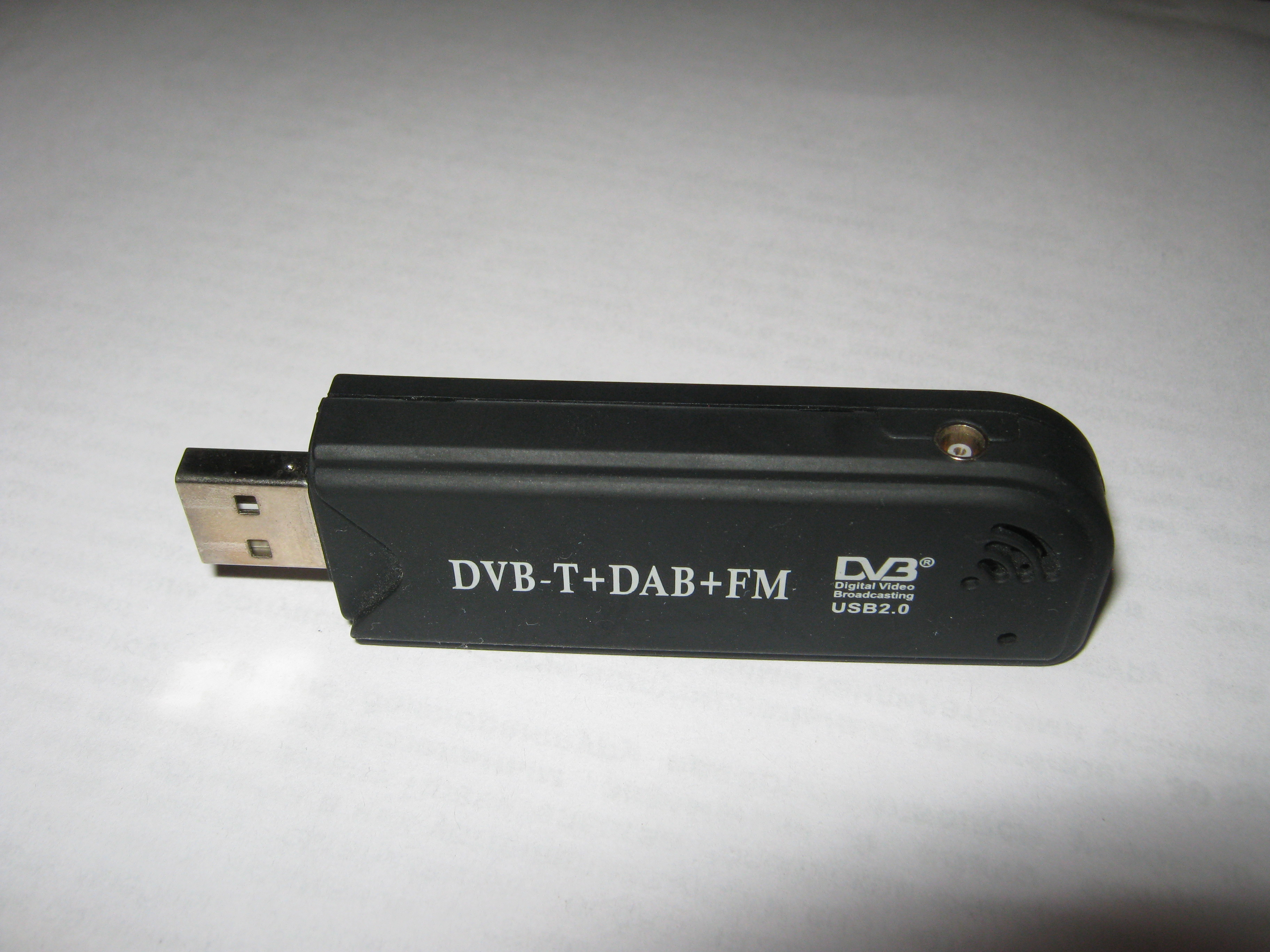 dvb-t usb приёмник на контроллере Realtek RTL2832U с тюнером Rafael Micro R820T